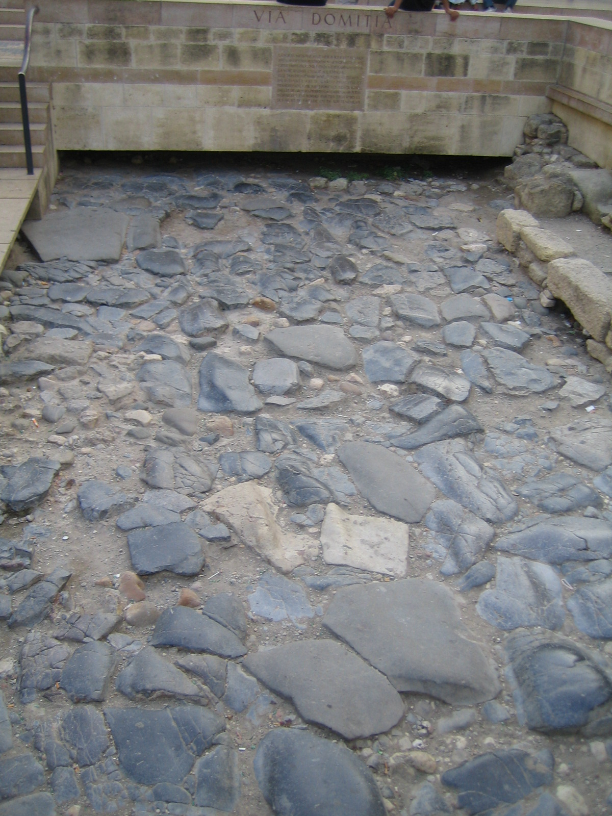 Calzada Romana